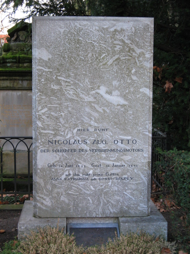 Grabstein von Nicolaus August Otto, Erfinder des Ottomotors, auf dem Melaten-Friedhof in Köln